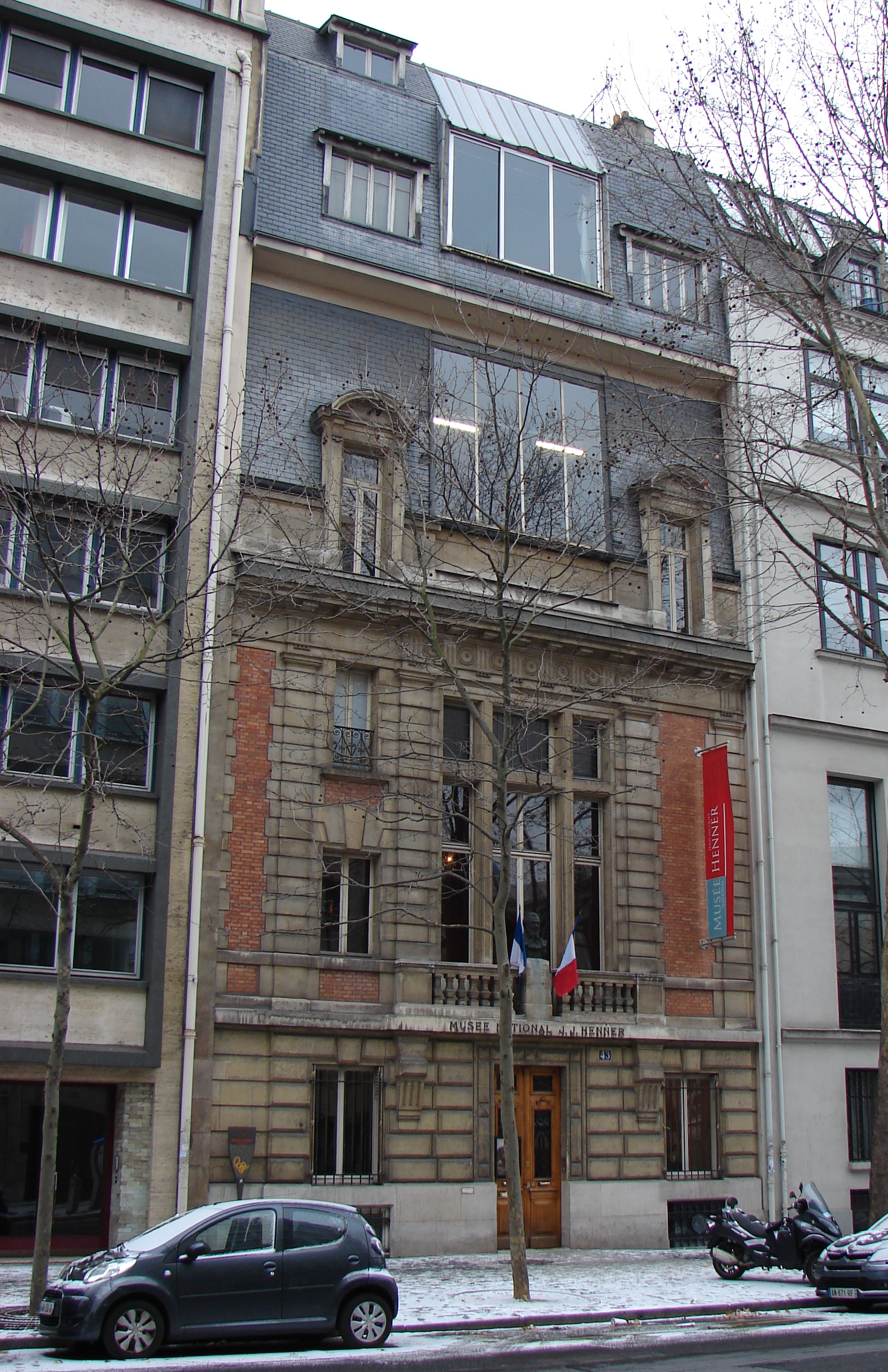 Façade du musée national Jean-Jacques Henner